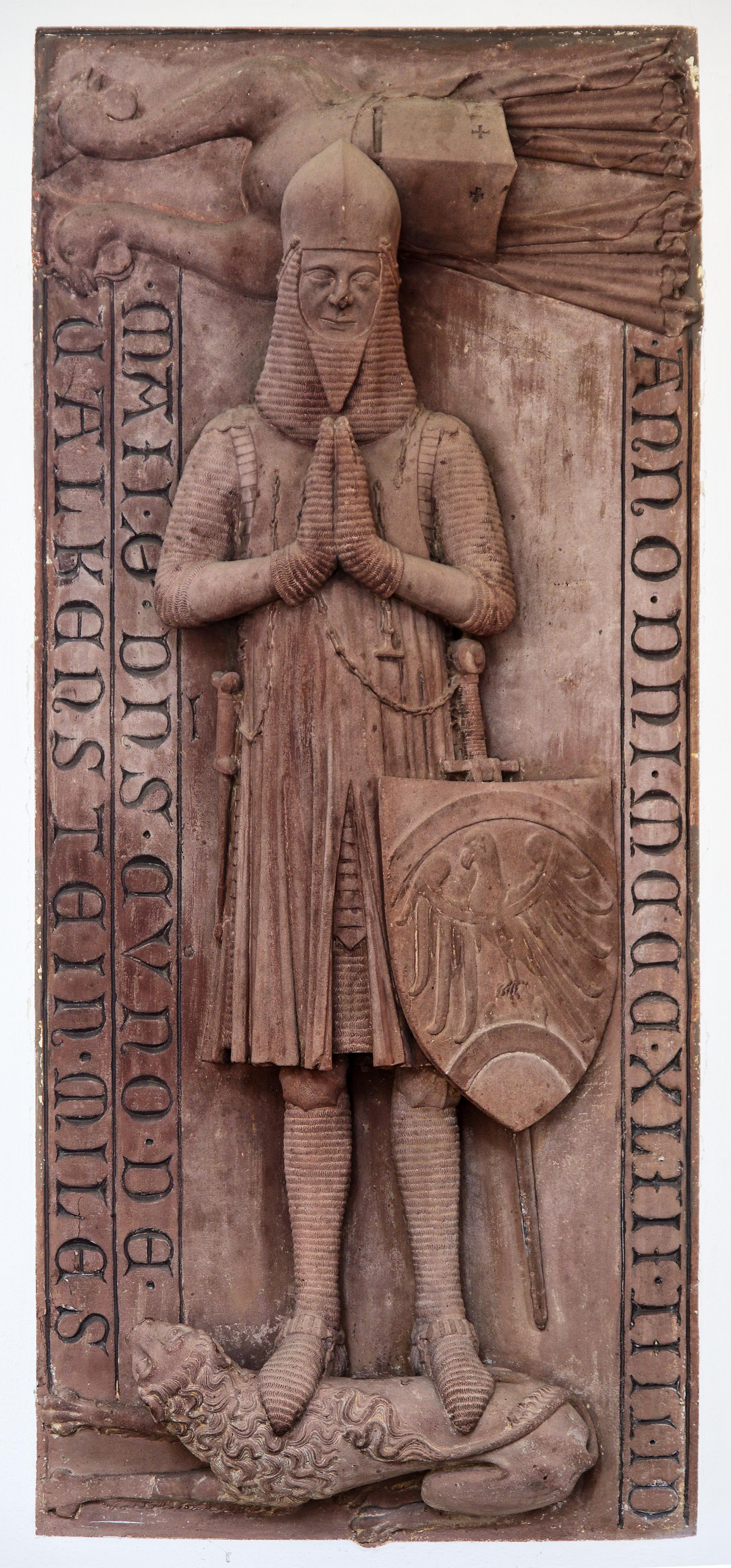 Die Grabplatte Kunos von Falkenstein, in der Kirche an der Nordwand „ANNO•DNI•MCCC•XLIII•IIII•ID MAII•Ø•DNS•CUNO•DE•VALKENSTEIN•MILES Im Jahr des Herrn 1343, am 4. Tag vor den Iden des Mai, starb Ritter Kuno von Falkenstein.“